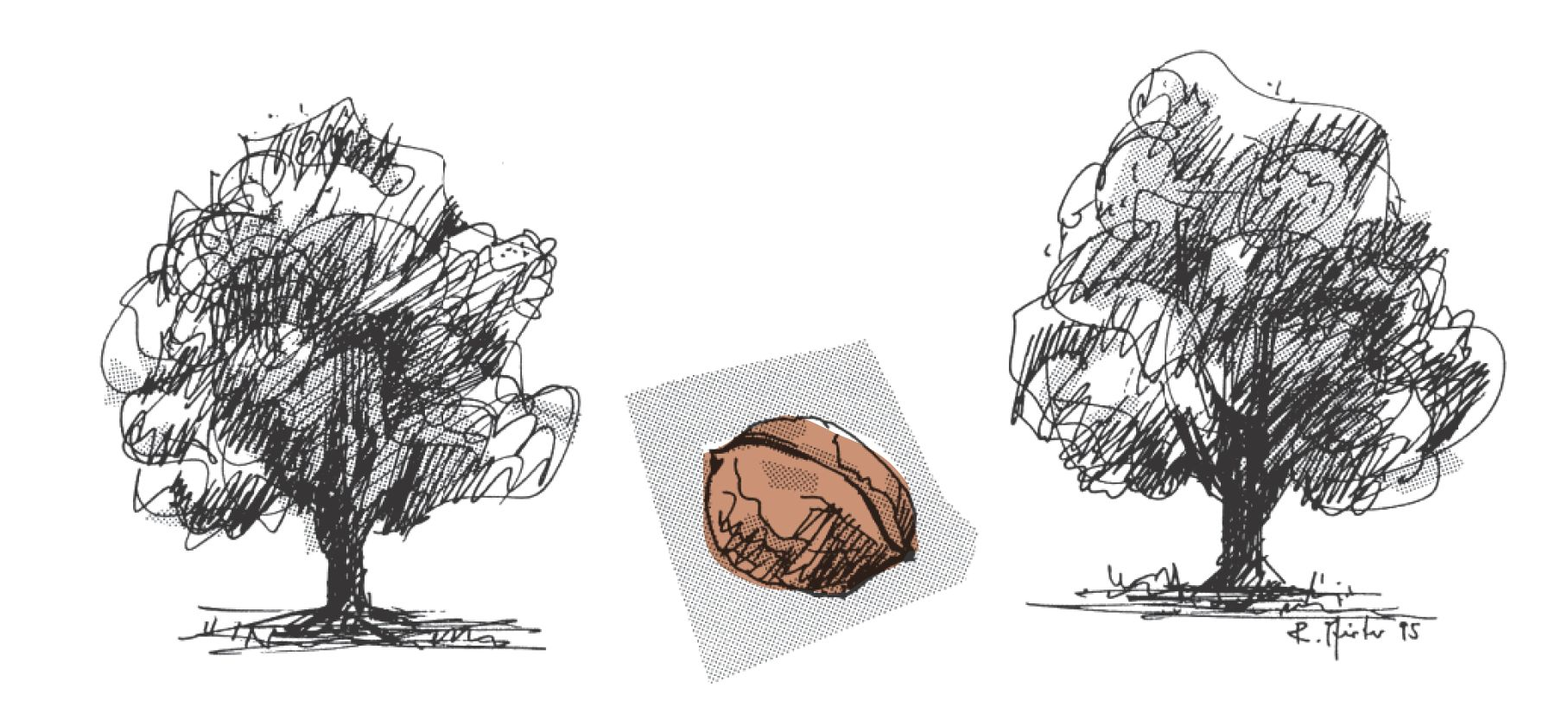 Das Baum-Nuss-Baum-Logo der Lehrkunst des Schweizer Künstlers und Kunstdozenten Ruedi Pfirter